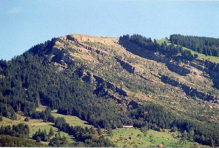 Abbruchstelle des Goldauer Bergsturzes am Rossberg im Jahr 2004